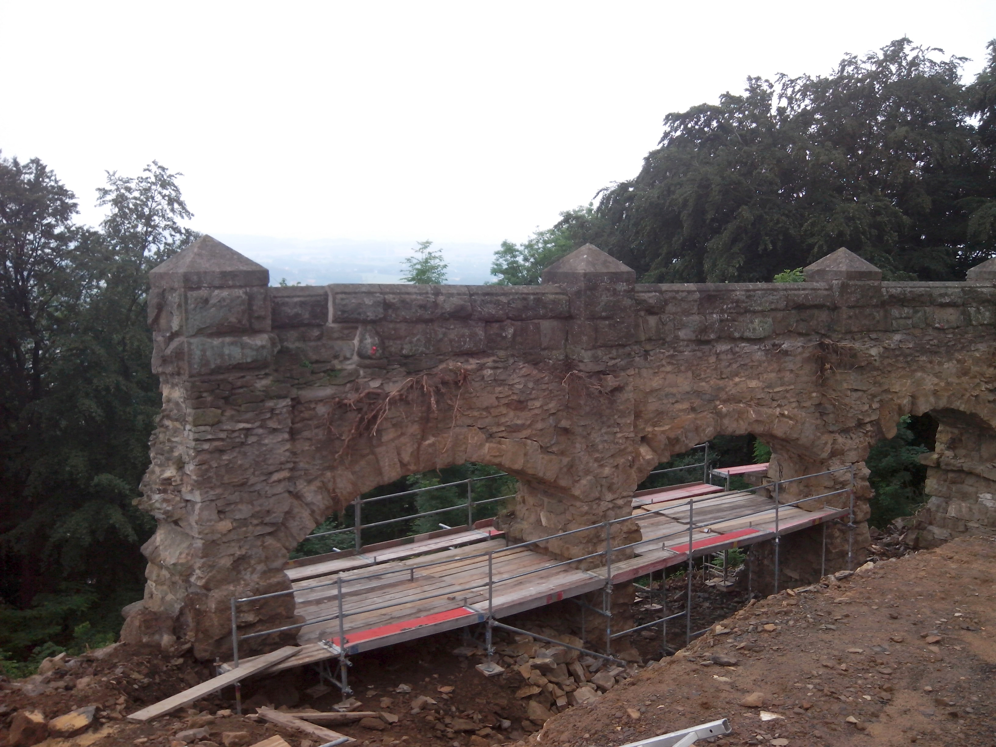 Freigelegte Stützmauer and der Südseite der Plattform